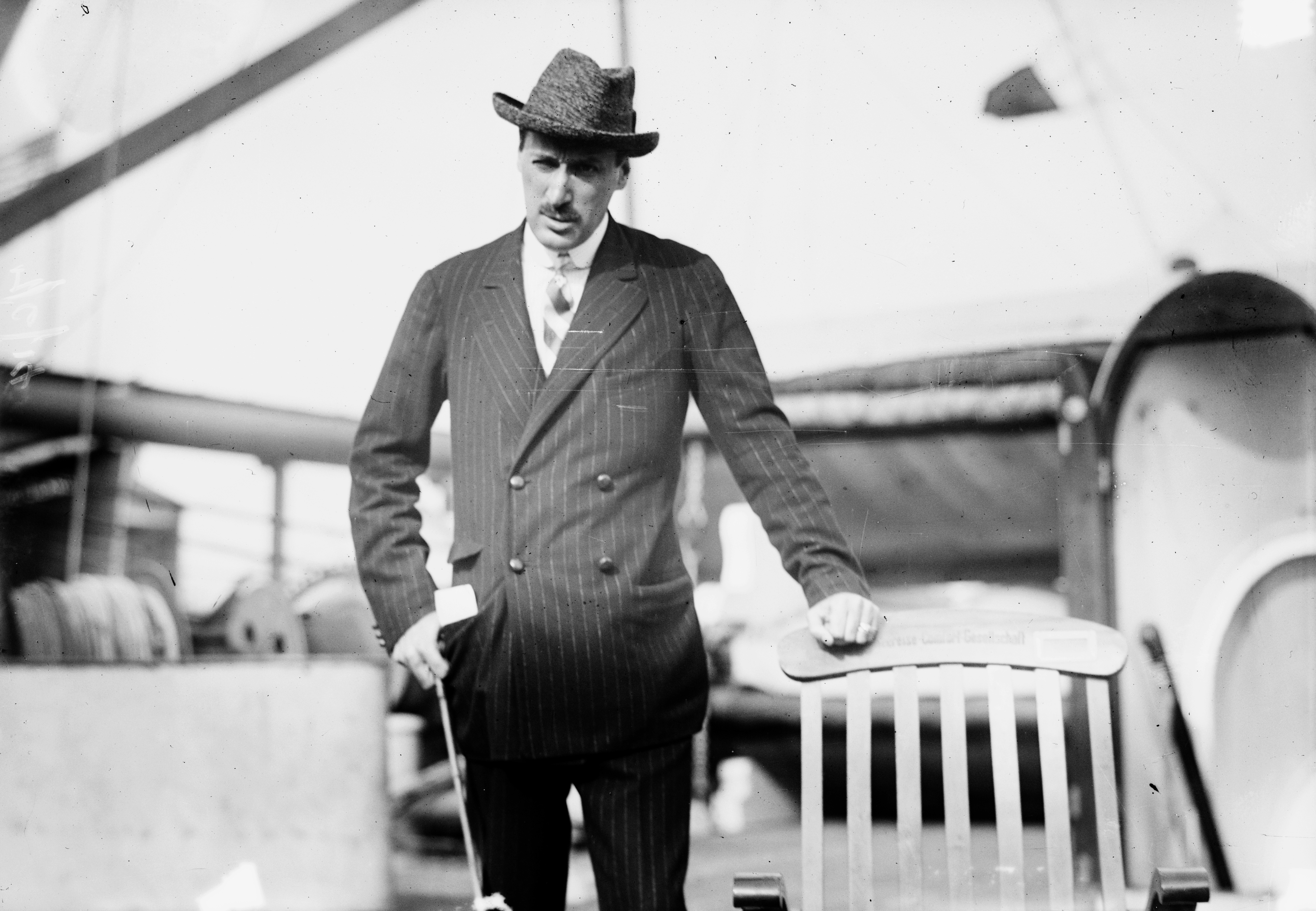 Gróf Károlyi Mihály egy hajó fedélzetén, teljes nevén: nagykárolyi Károlyi Mihály Ádám György Miklós (Budapest, 1875. március 4. – Vence, Franciaország, 1955. március 19.) politikus, miniszterelnök, az első magyar köztársasági elnök, emigráns baloldali, a második világháború után rövid ideig nagykövet.